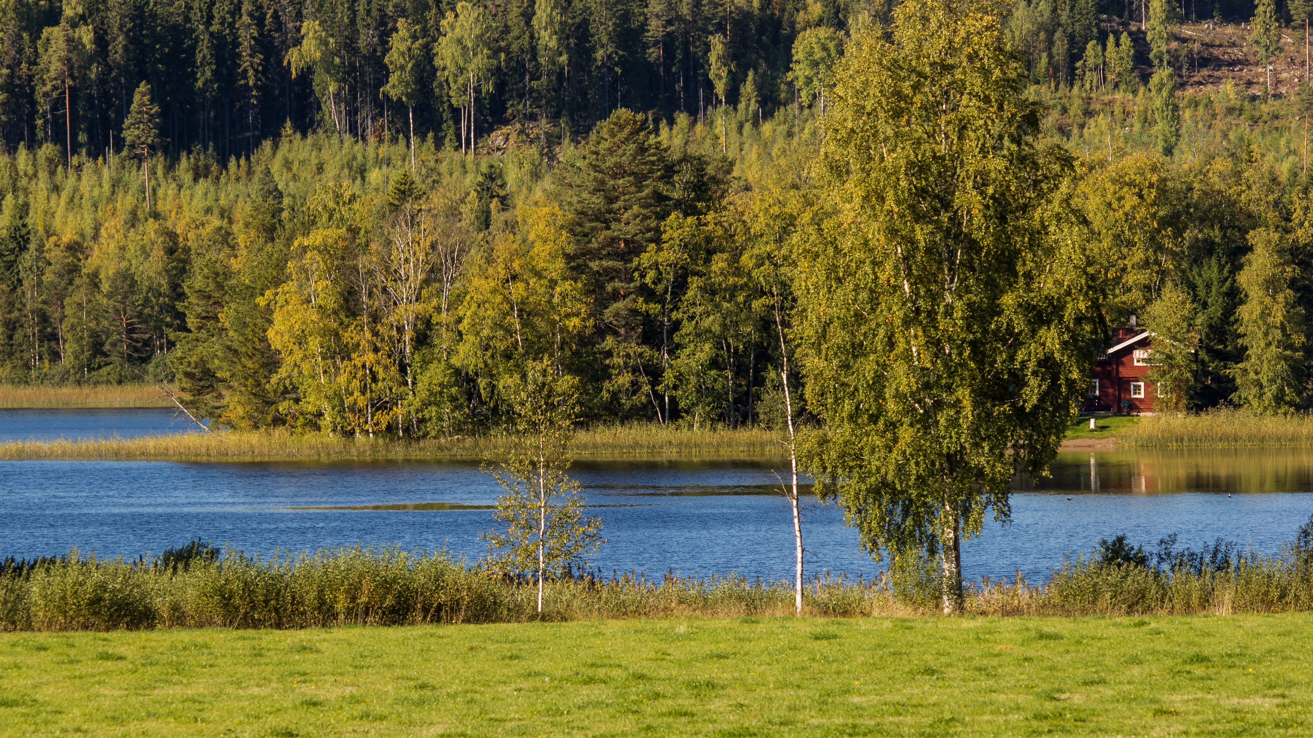 Mörkön (Säter 35:1)